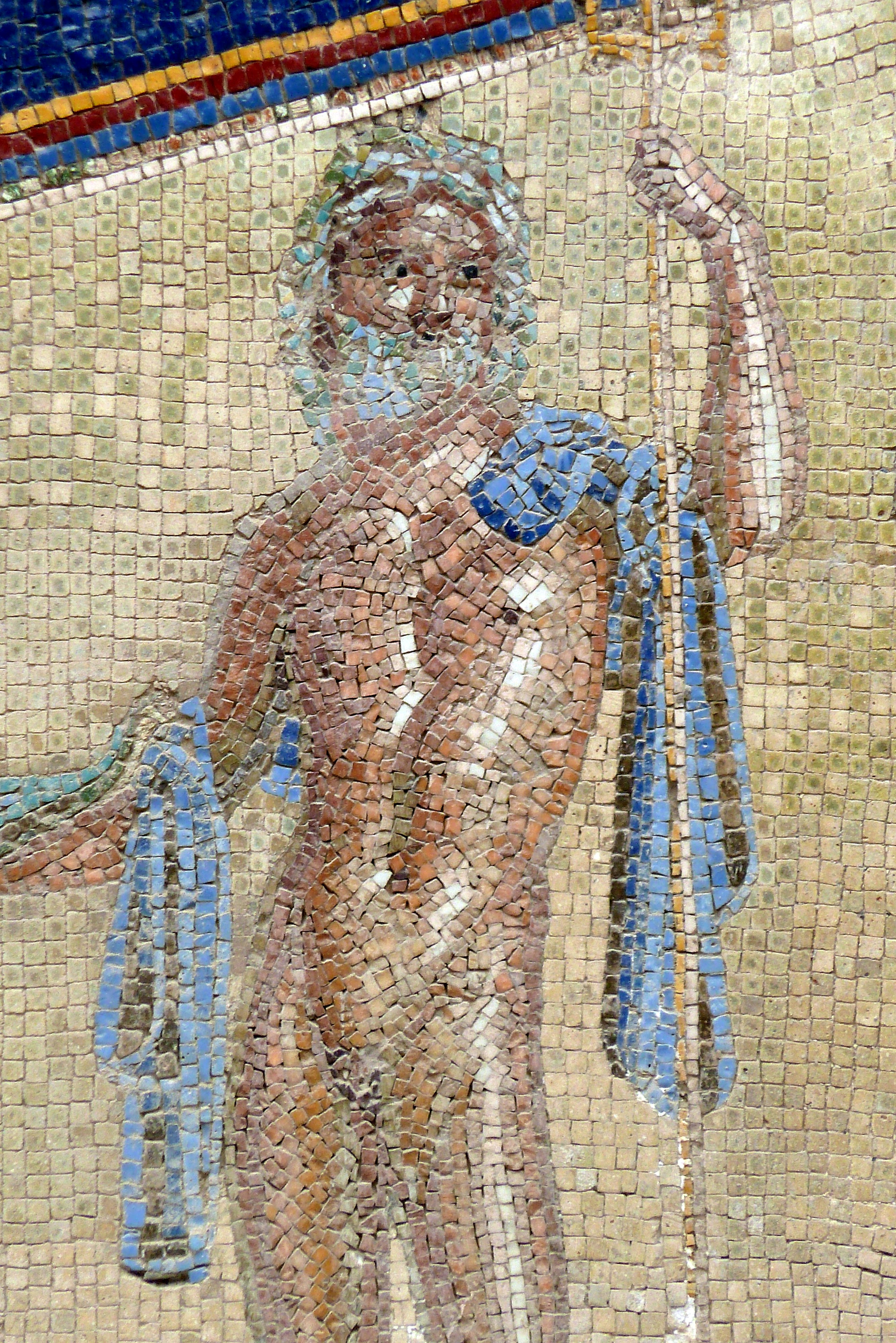 Casa di Nettuno ed Anfitrite (Ins. V) - Triclinium (dining room) decor - titular mosaic of Neptune and Amphitrite (detail)